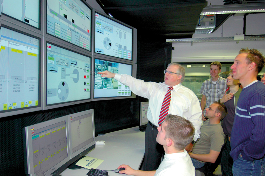 Fachbereich Automatisierung und Informatik, Hochschule Harz (FH)